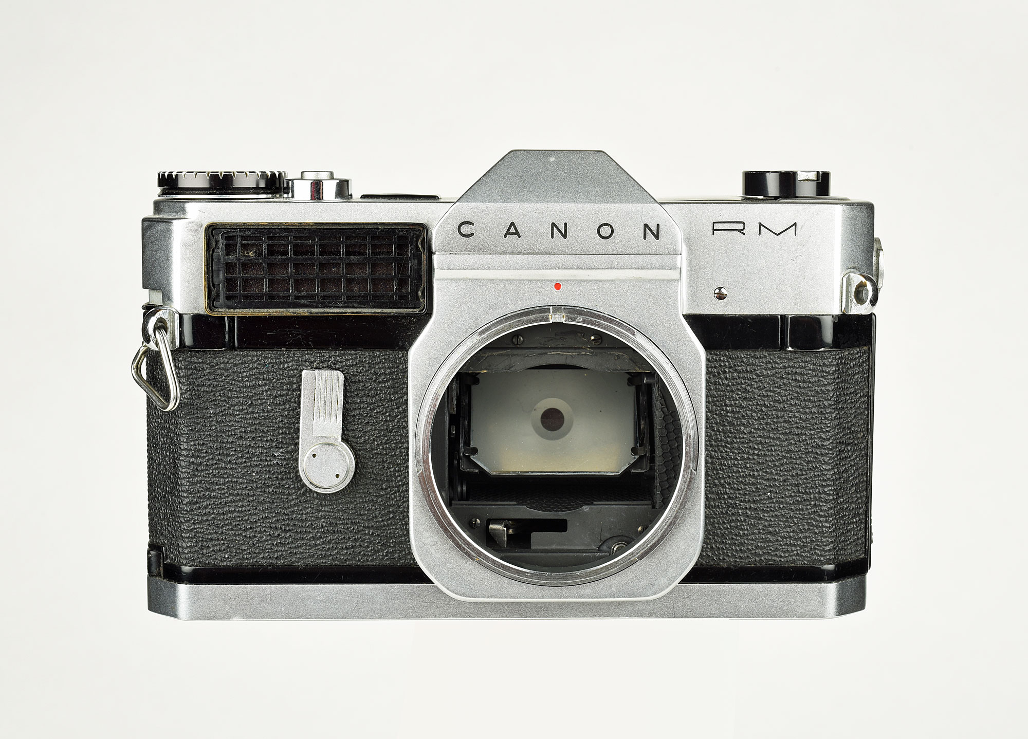 Canonflex RM de face avec vue sur sa baïonnette Canon R